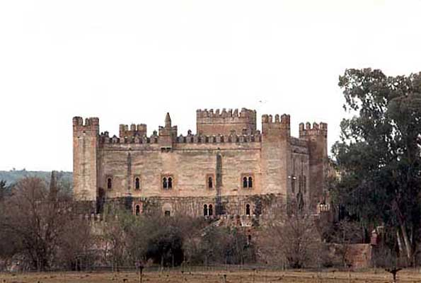 Castillo de Malpica (Toledo, Castilla-La Mancha). Malpica Castle (Toledo, Castile-La Mancha)